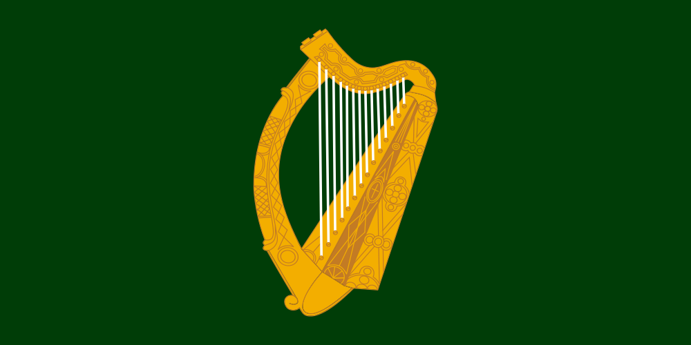 Flag of Leinster